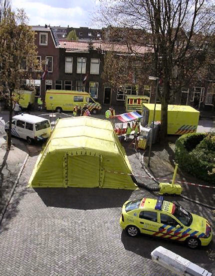 Geneeskundige Combinatie Nieuwe Waterweg Noord tijdens een demonstratie in Vlaardingen.